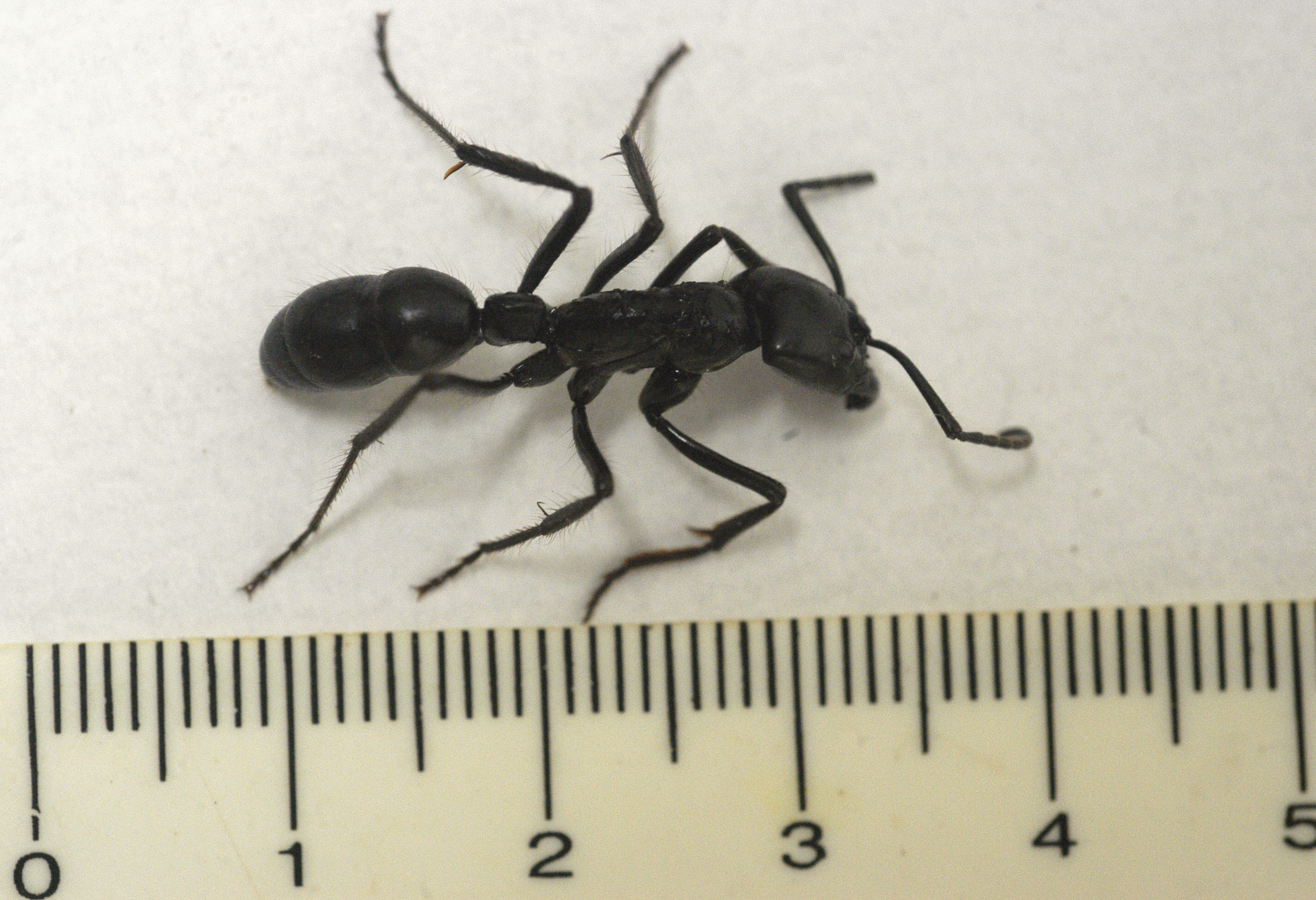 Dinoponera